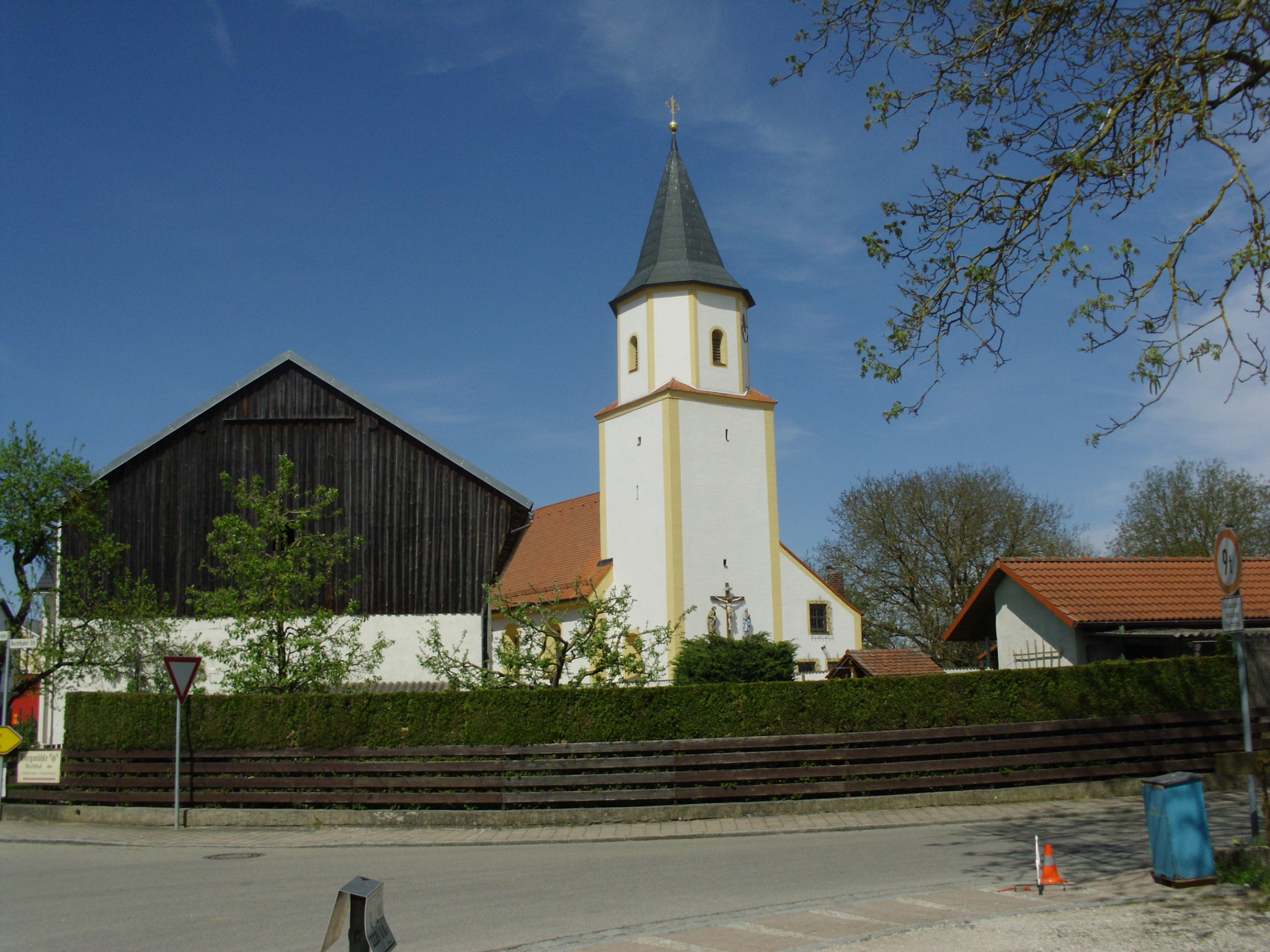 Reuth am Wald (Ortsteil von Raitenbuch im Landkreis Weißenburg-Gunzenhausen), Kath. Filialkirche St. Pantaleon